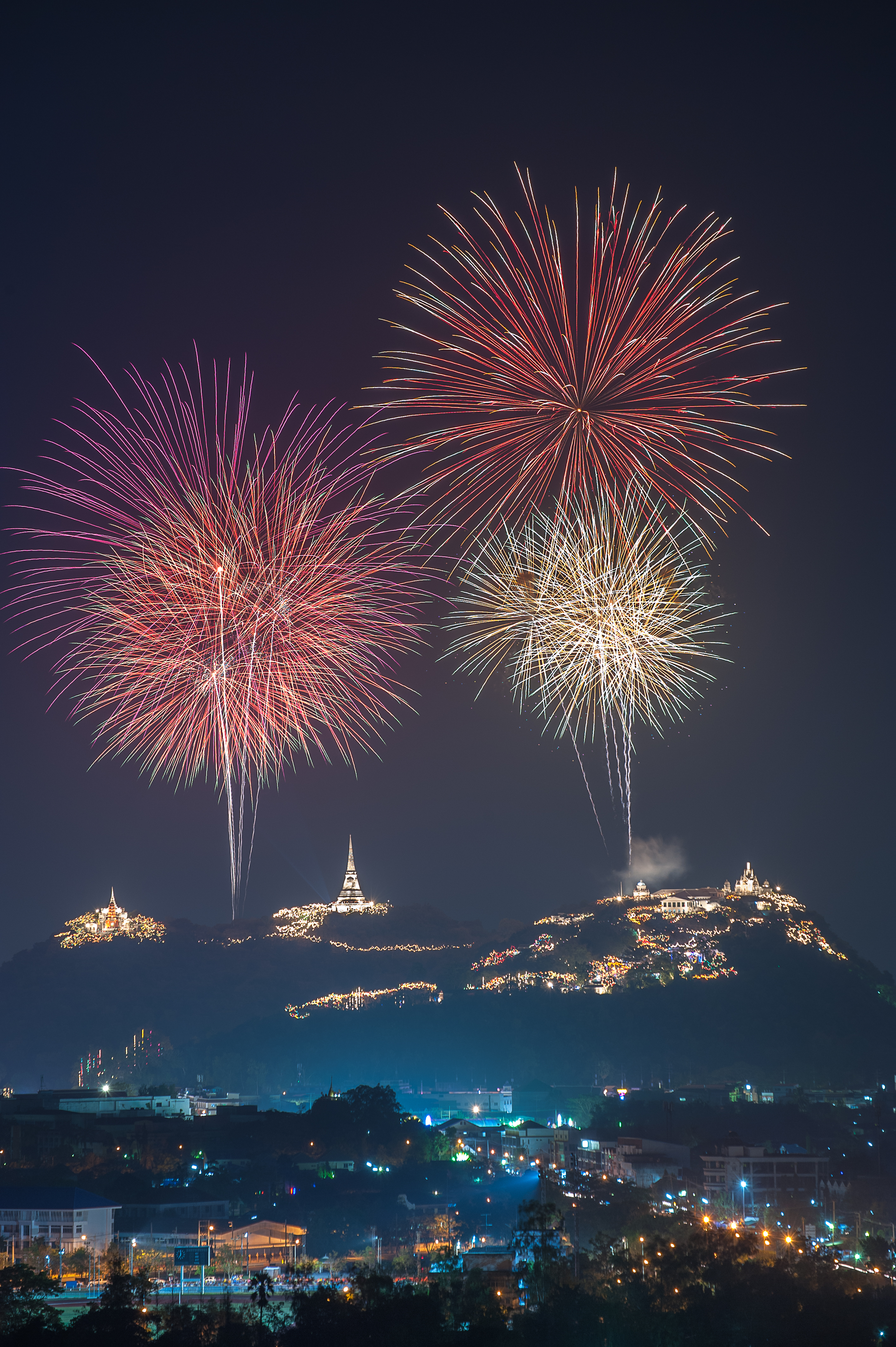 งานพลุเขาวังจะมองเห็นวัดพระแก้วน้อยอยู่ทางด้านขวาของภาพ